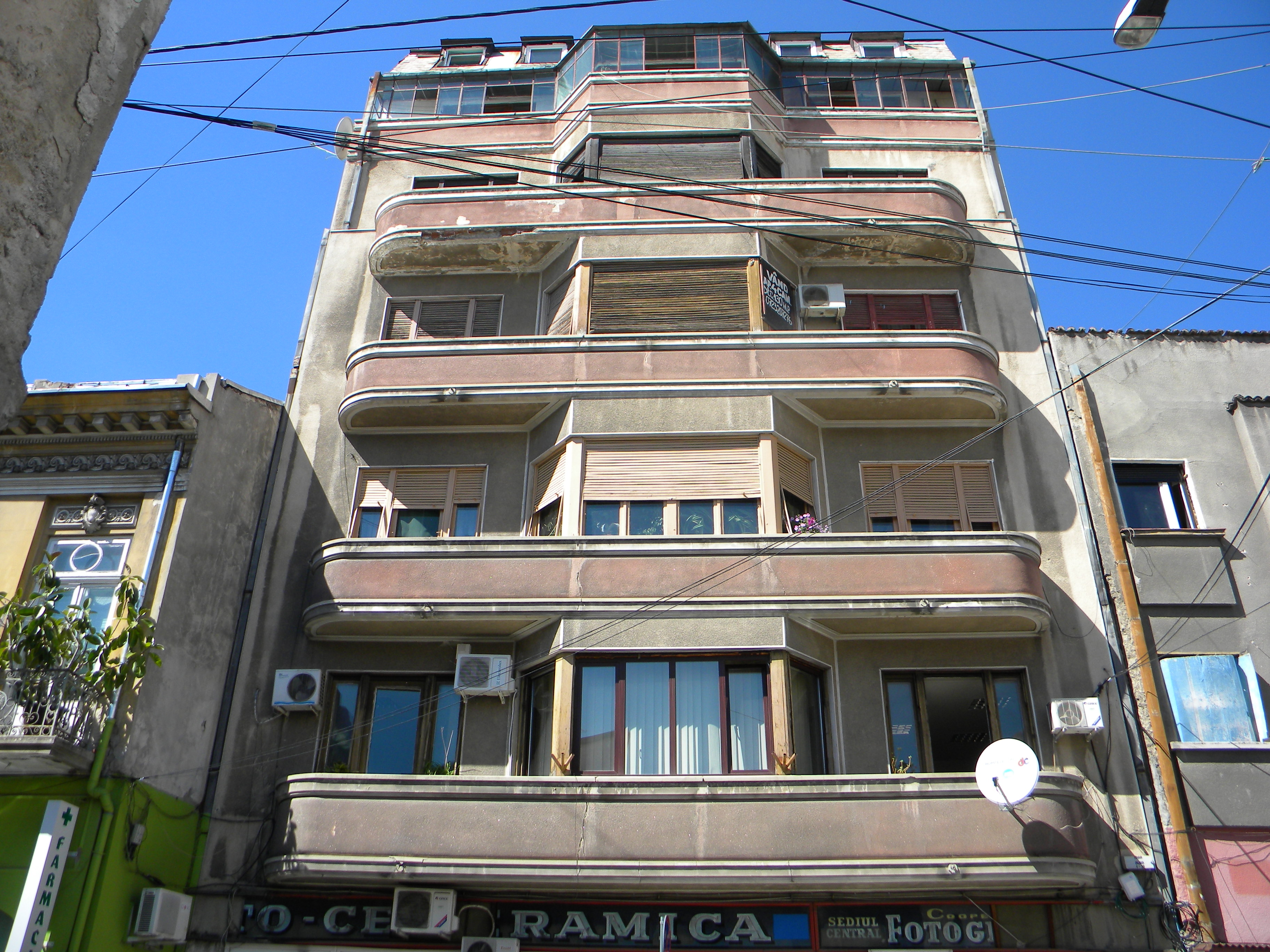 Bucuresti, Romania, Imobil pe Str. Coltei nr. 9, sect. 3 (1)